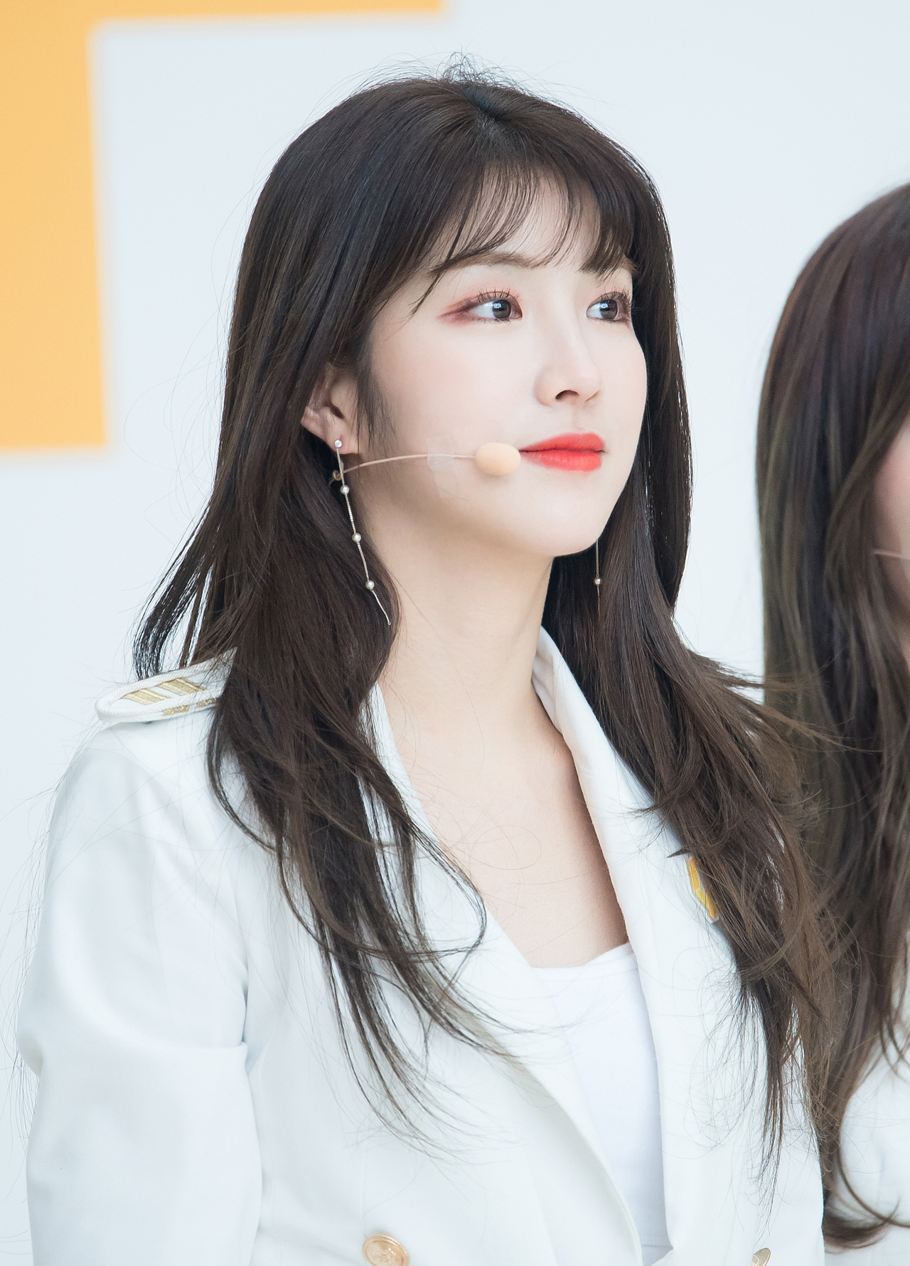 180211 더유닛 유닛G